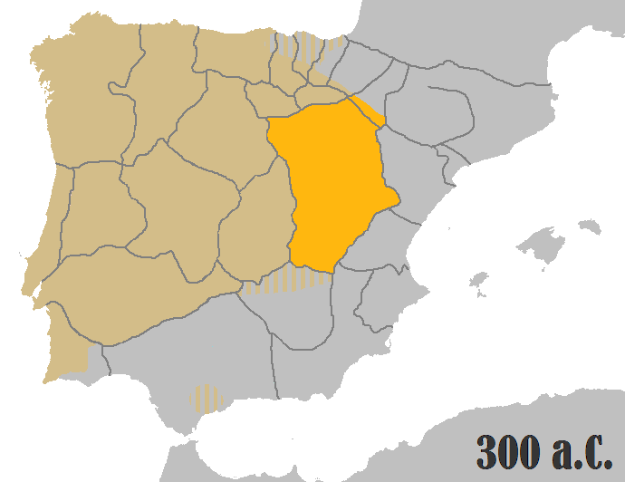 Idioma celtíbero